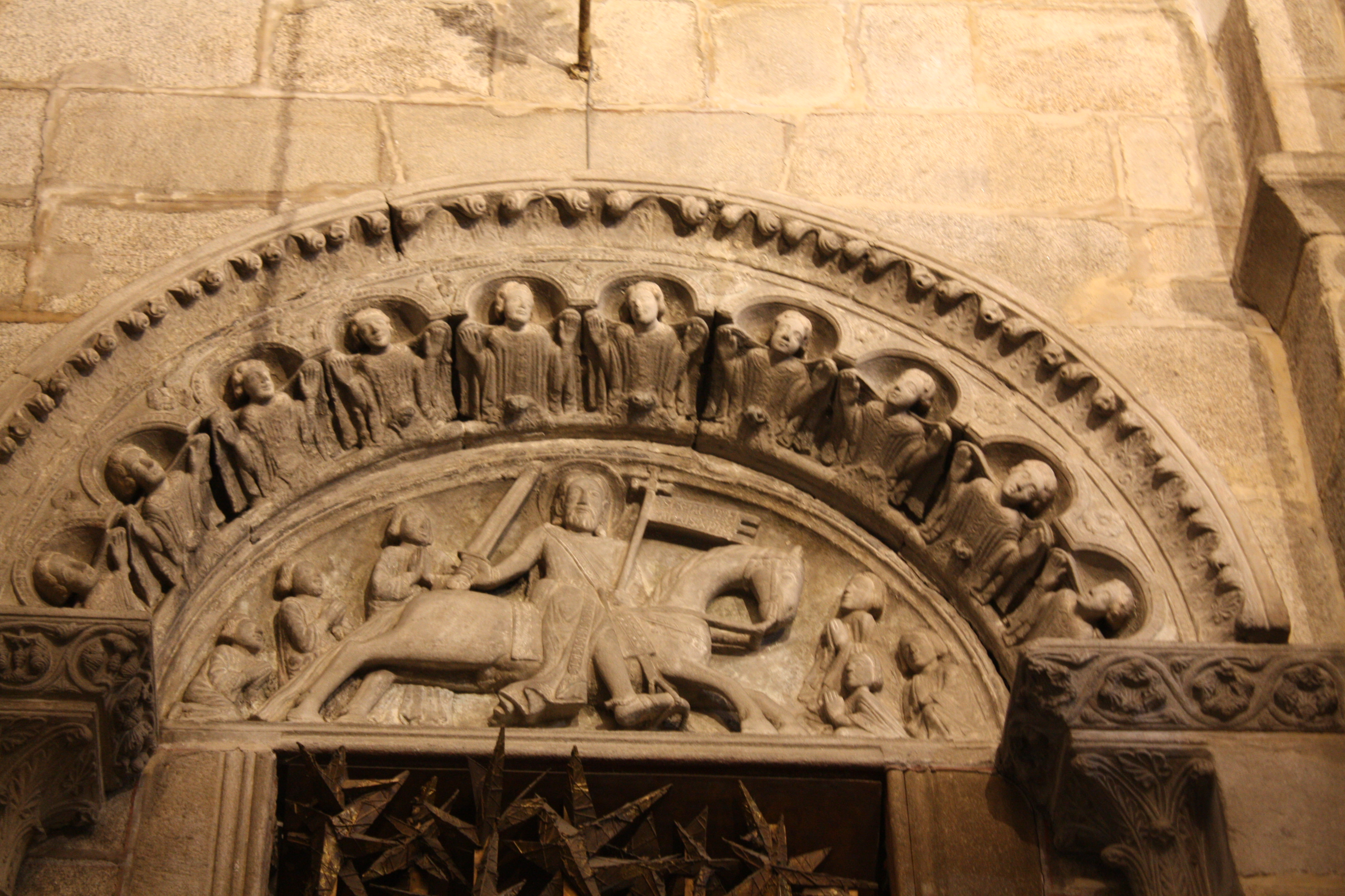 Tímpano que representa a Batalla de Clavijo, no interior da Catedral de Santiago.